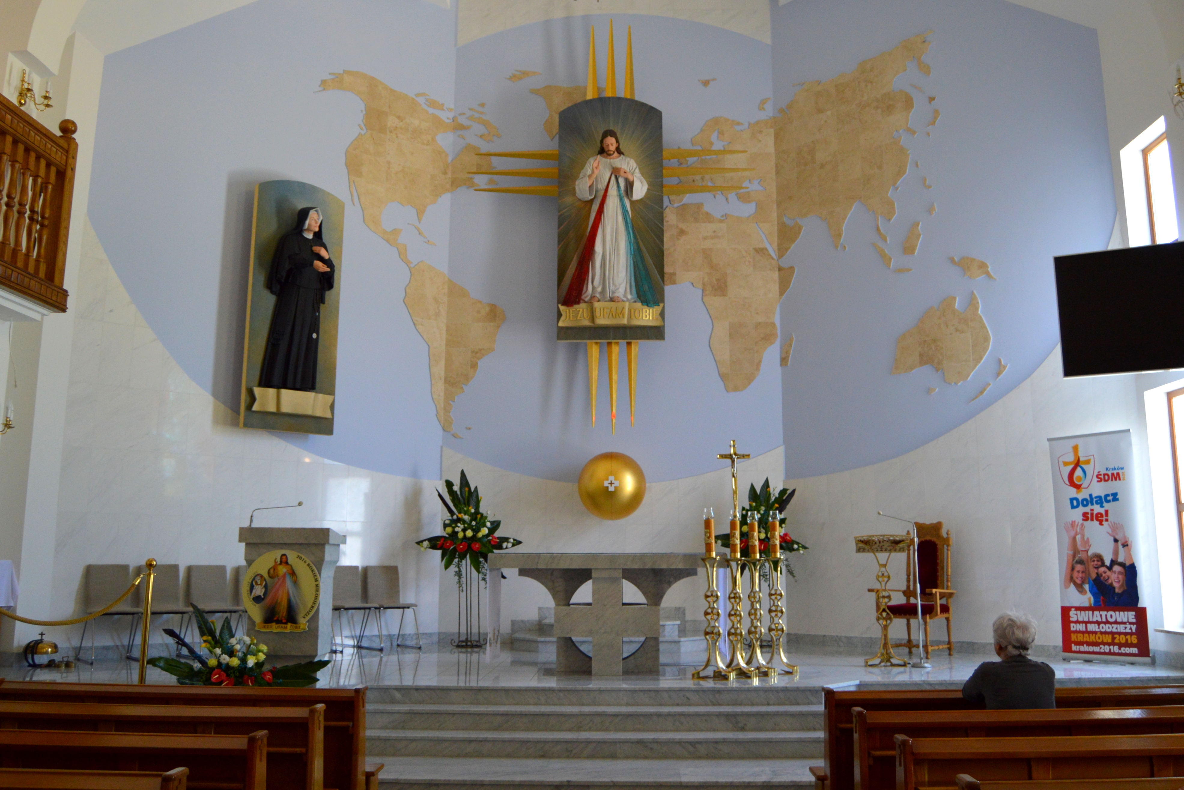 Ołtarz główny w nowym kościele w Świnicach Warckich